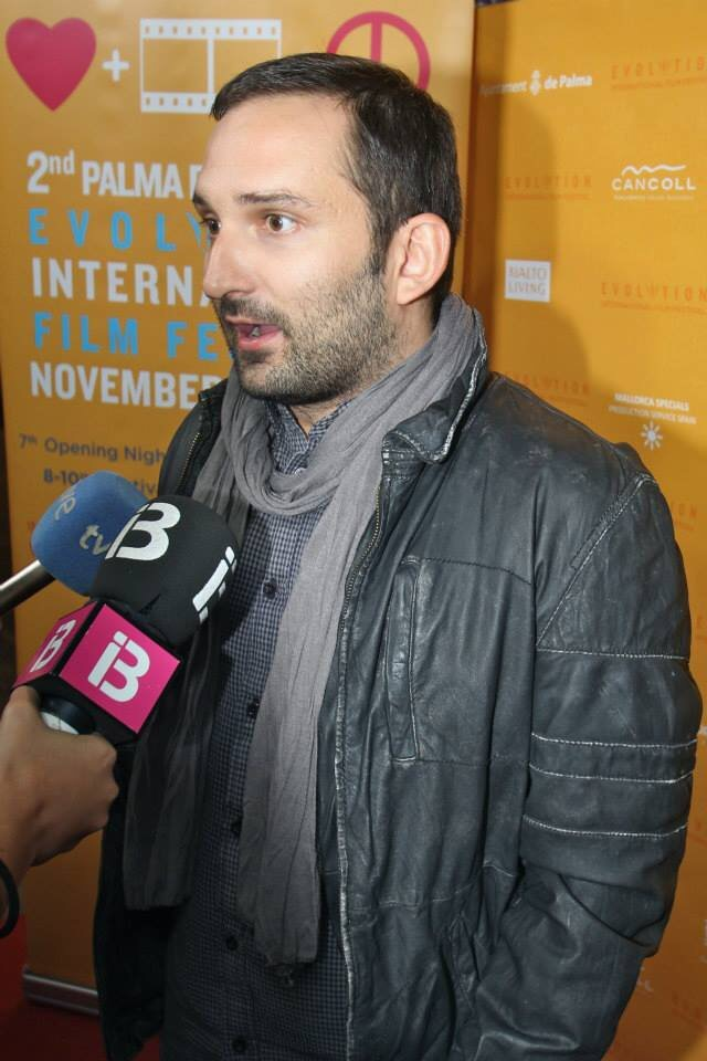 Marcos Cabotá